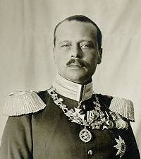 Ernst Lodewijk van Hessen